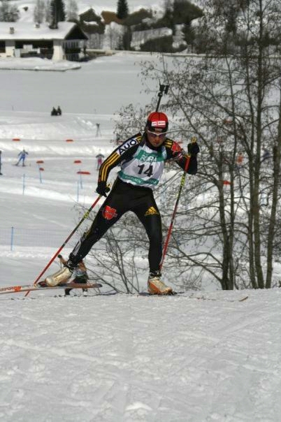 See Title